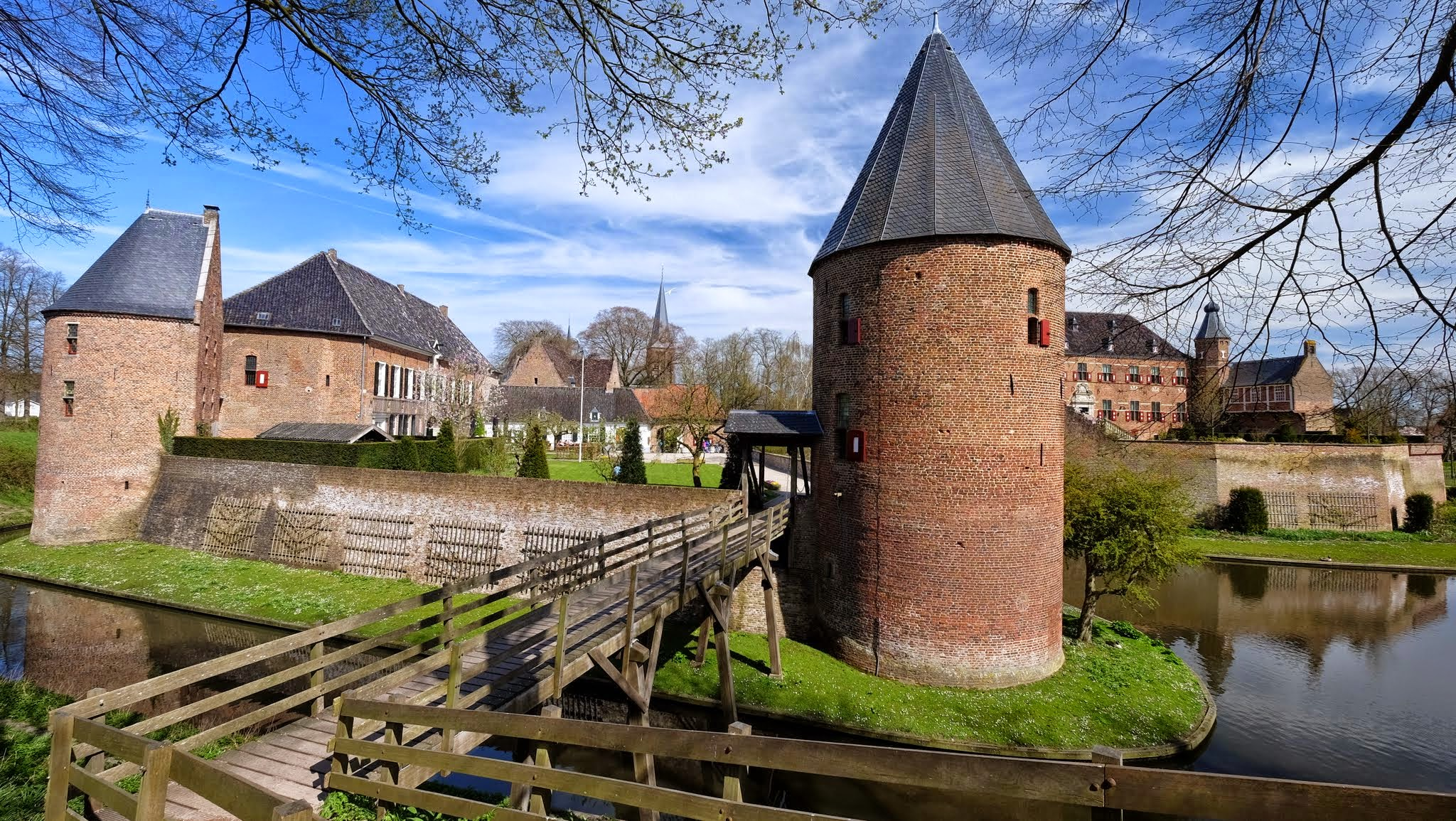 7041 's-Heerenberg, Netherlands